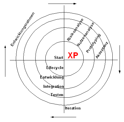 XP Lifecycle